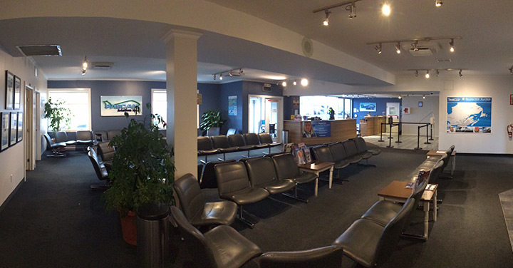 Vue intérieur du FBO de Pascan Aviation à St-Hubert, Québec